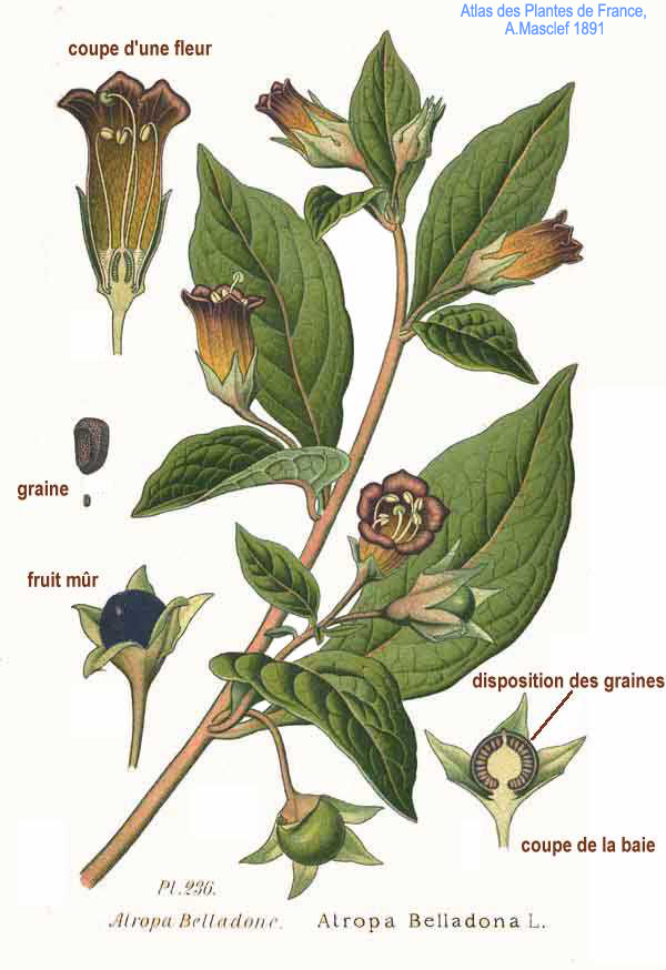 Atropa belladona L.